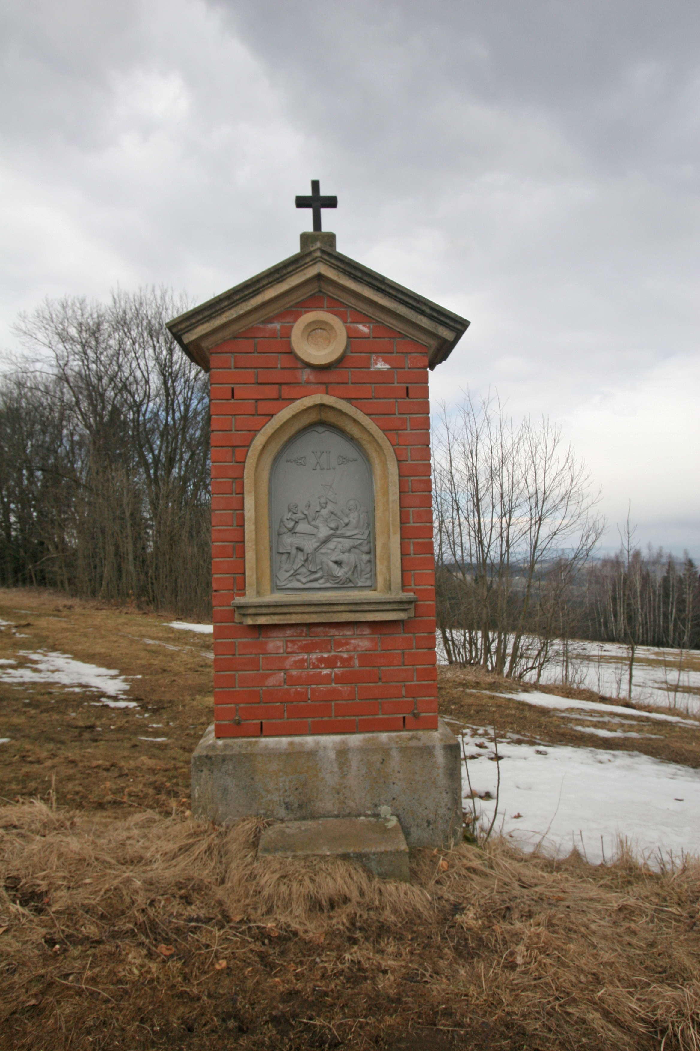 Křížová cesta (Chlum), Tábor, Chlum